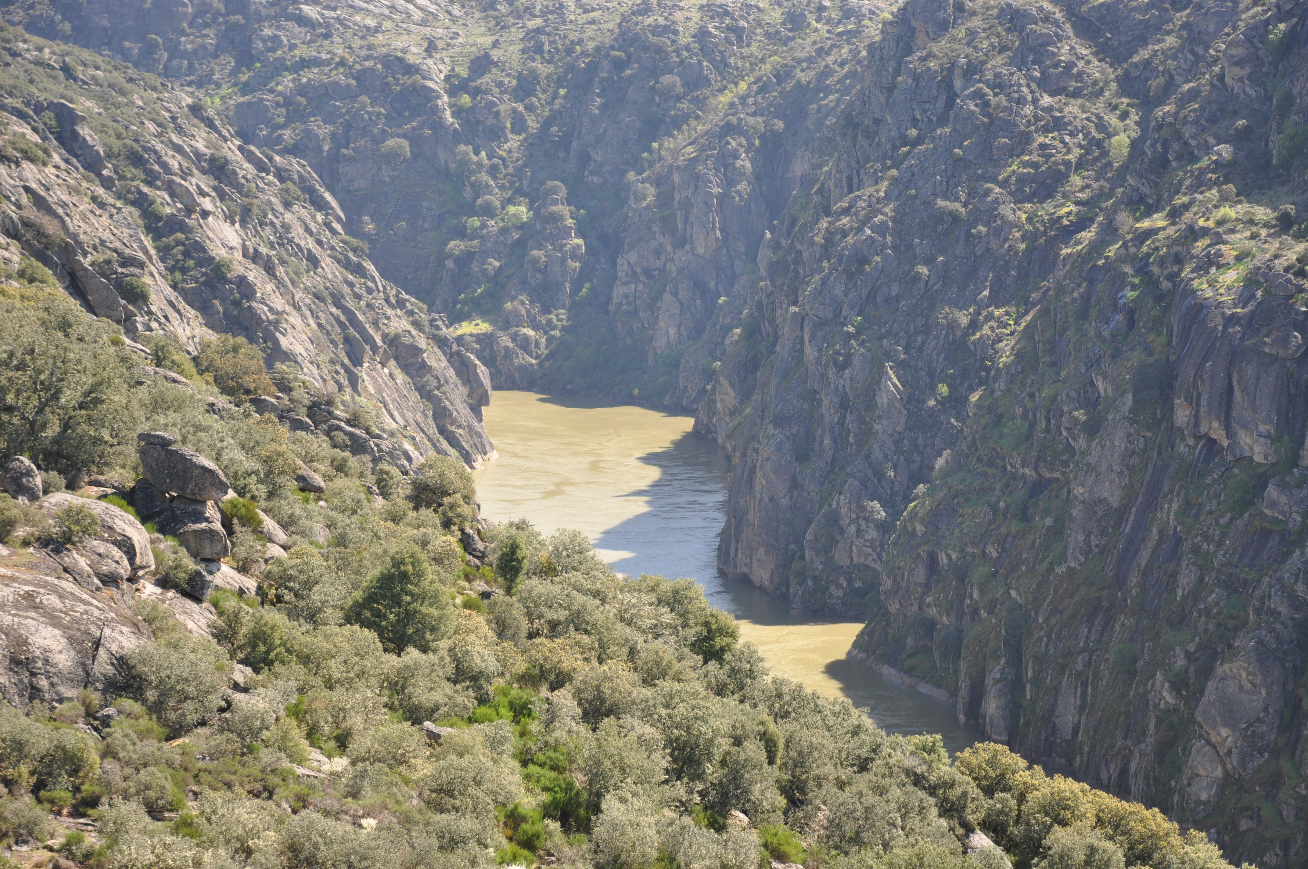 El río Duero desde el castro. This is a photography of a Site of Community Importance in Portugal with the ID: PTCON0022. Natura2000 entry, EEA entry